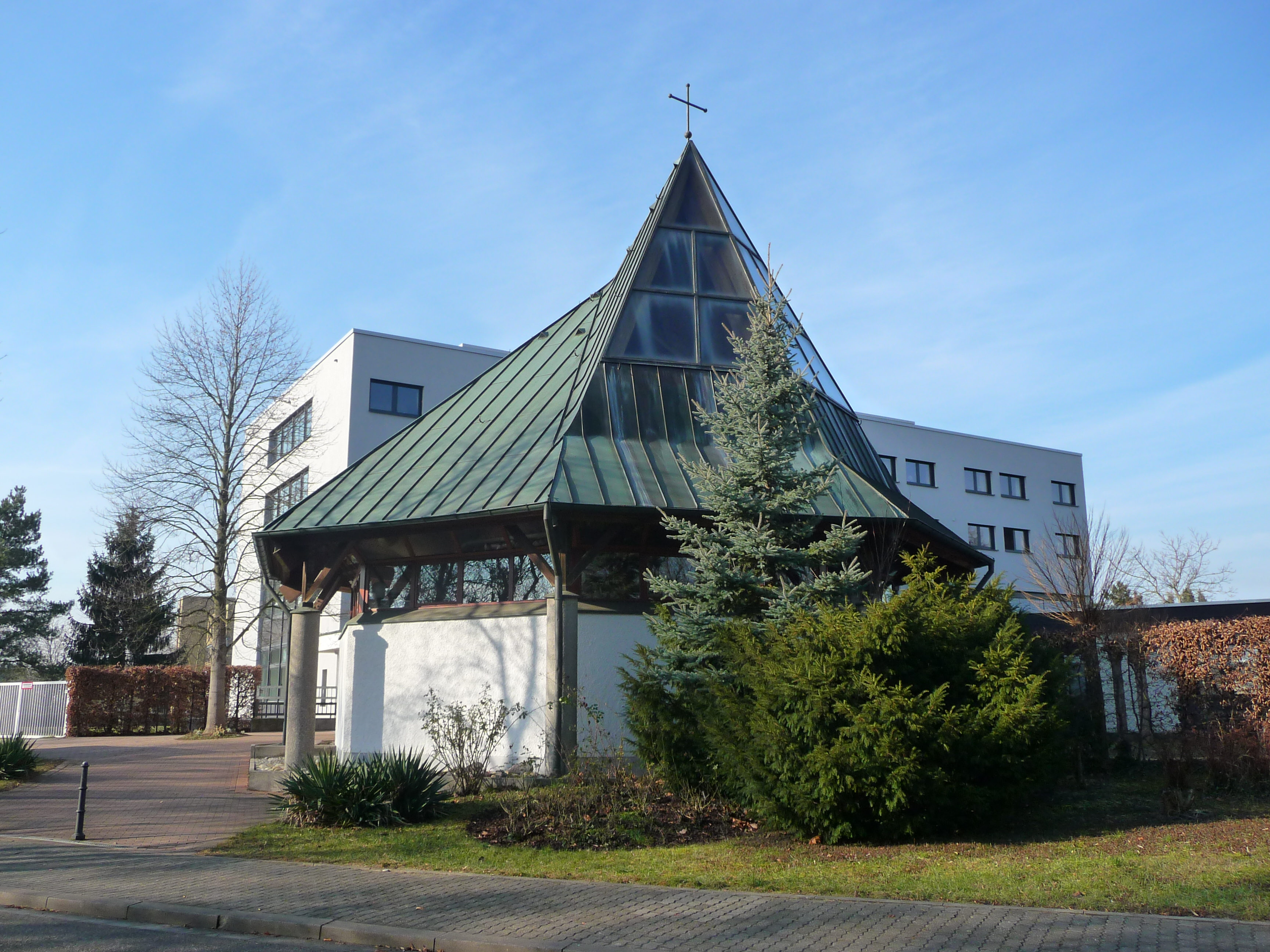 Kapelle der Niklaus-von-Weis-Schulen in Speyer